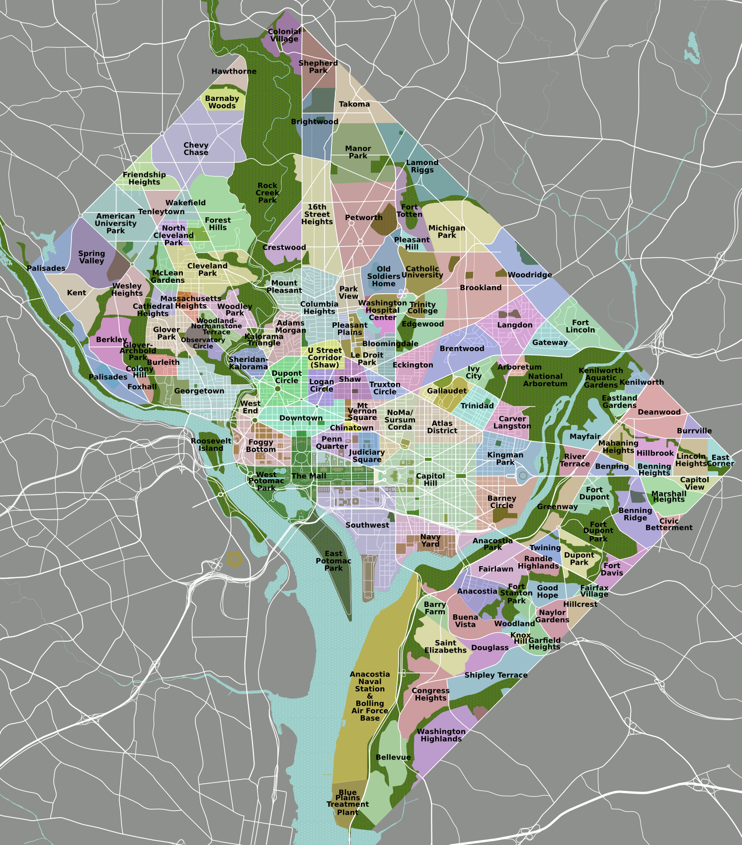 DC neighborhoods map